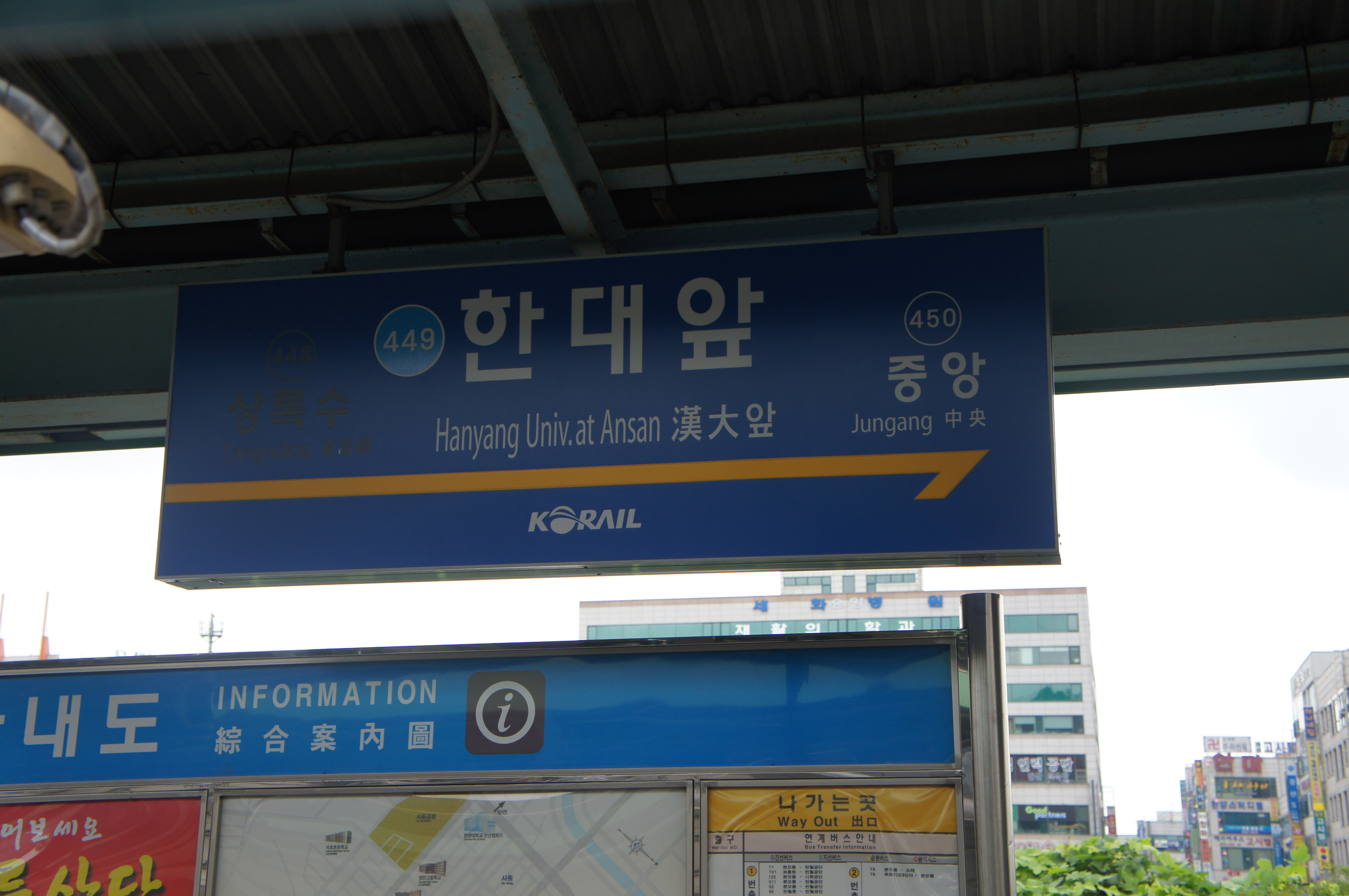 한대앞역 역명판